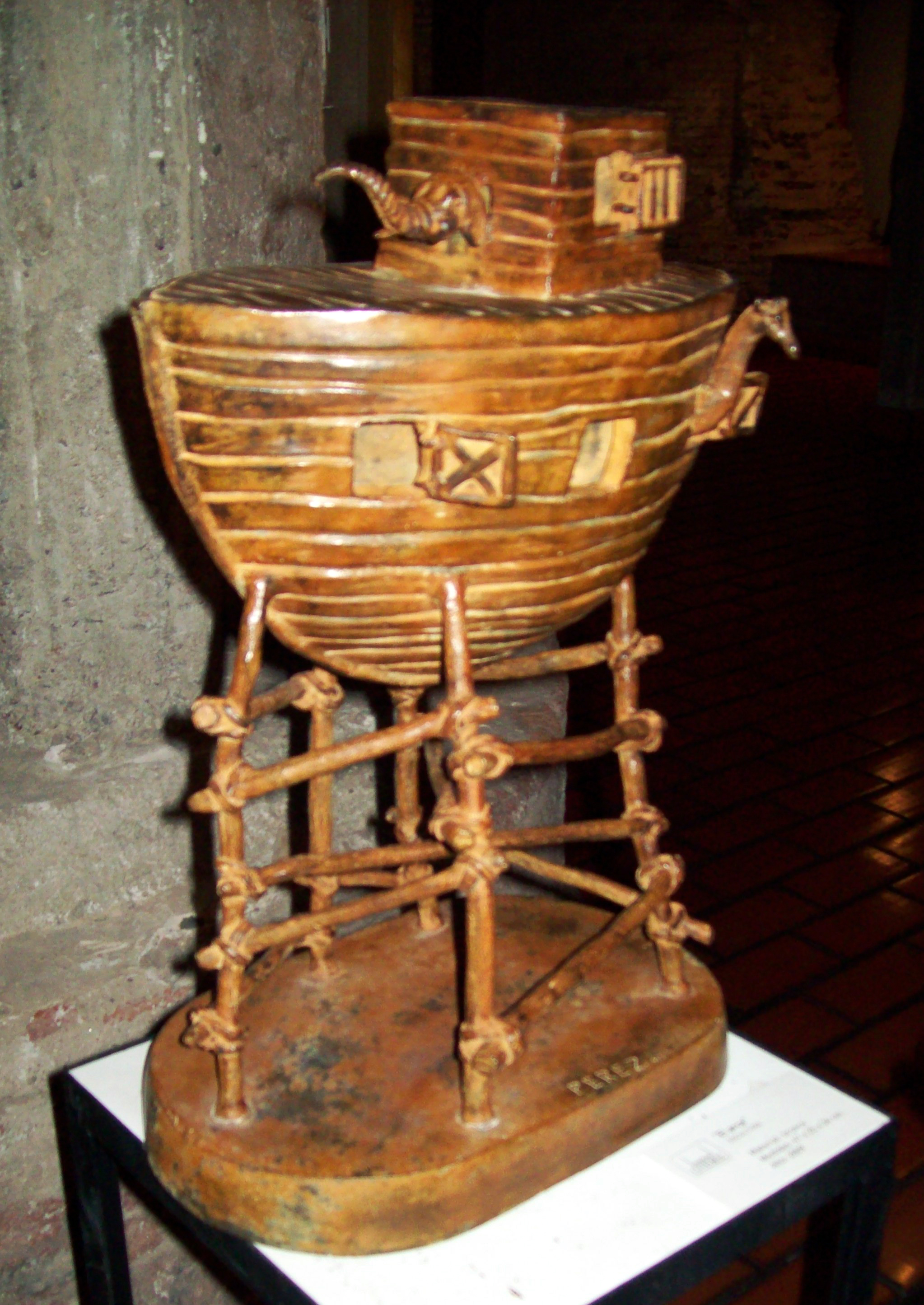 Escultura del Arca de Noé en bronce, presnete en el Museo de la Catedral de La Plata.